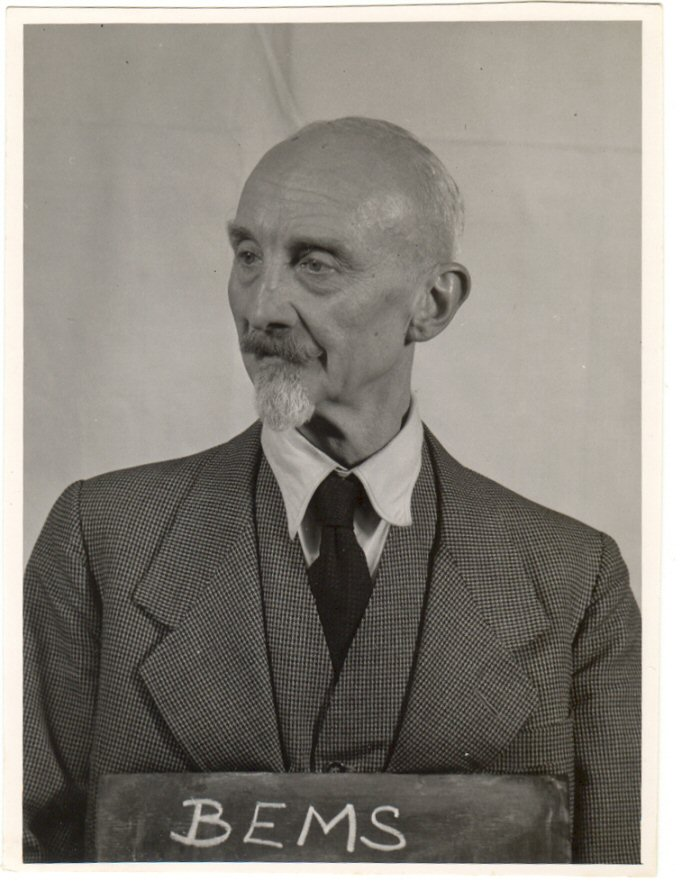 Emil Bems (* 1881 in Bayreuth), war zur Zeit des Nationalsozialismus Generalstaatsanwalt in Nürnberg. Nach dem Zweiten Weltkrieg wurde er im Rahmen der Nürnberger Prozesse vernommen.